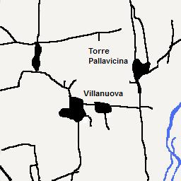 Plan de situation de Torre Pallavicina (Lombardie, Italie)